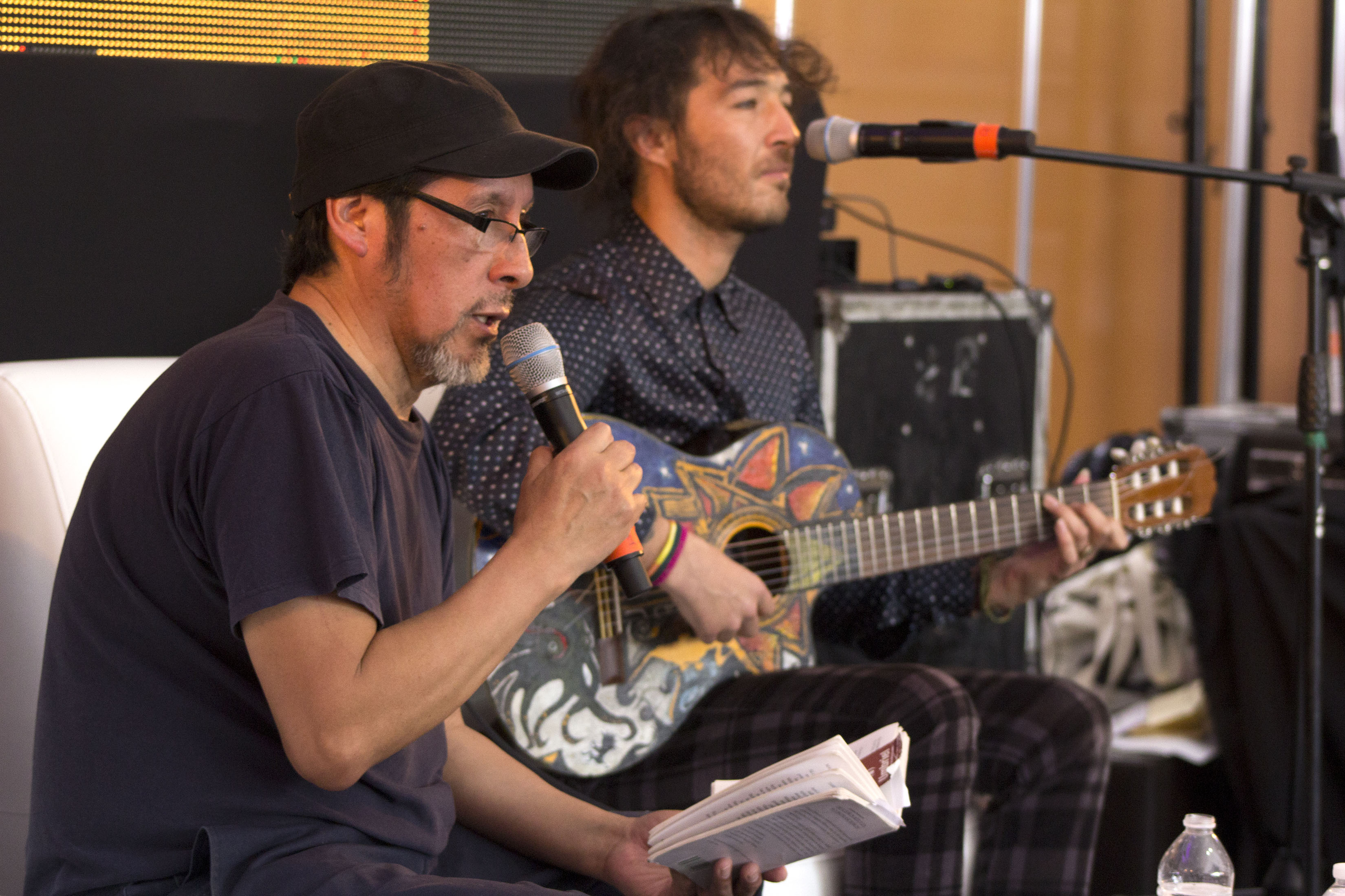 Domingo 22 de octubre del 2017. En el marco de la XVII Feria Internacional del Libro en el Zócalo 2017, en el Stand de Chile se realizó la lectura de poesía de Elicura Chihuilaf Nahuelpán, musicalizado por el cantante Chinoy. Fotografía: Gerardo Ramírez / Secretaría de Cultura